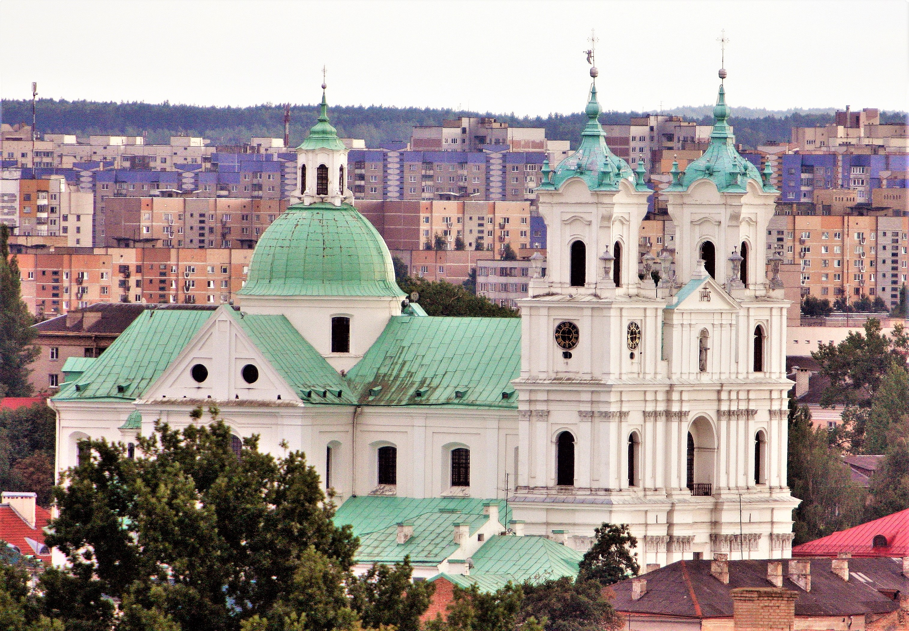 Беларуская (тарашкевіца): Вежавы гадзіньнік фарнага касьцёлу. г. Горадня This is a photo of Belarusian heritage monument. Reference number: 411Г0000244 ( WLM)